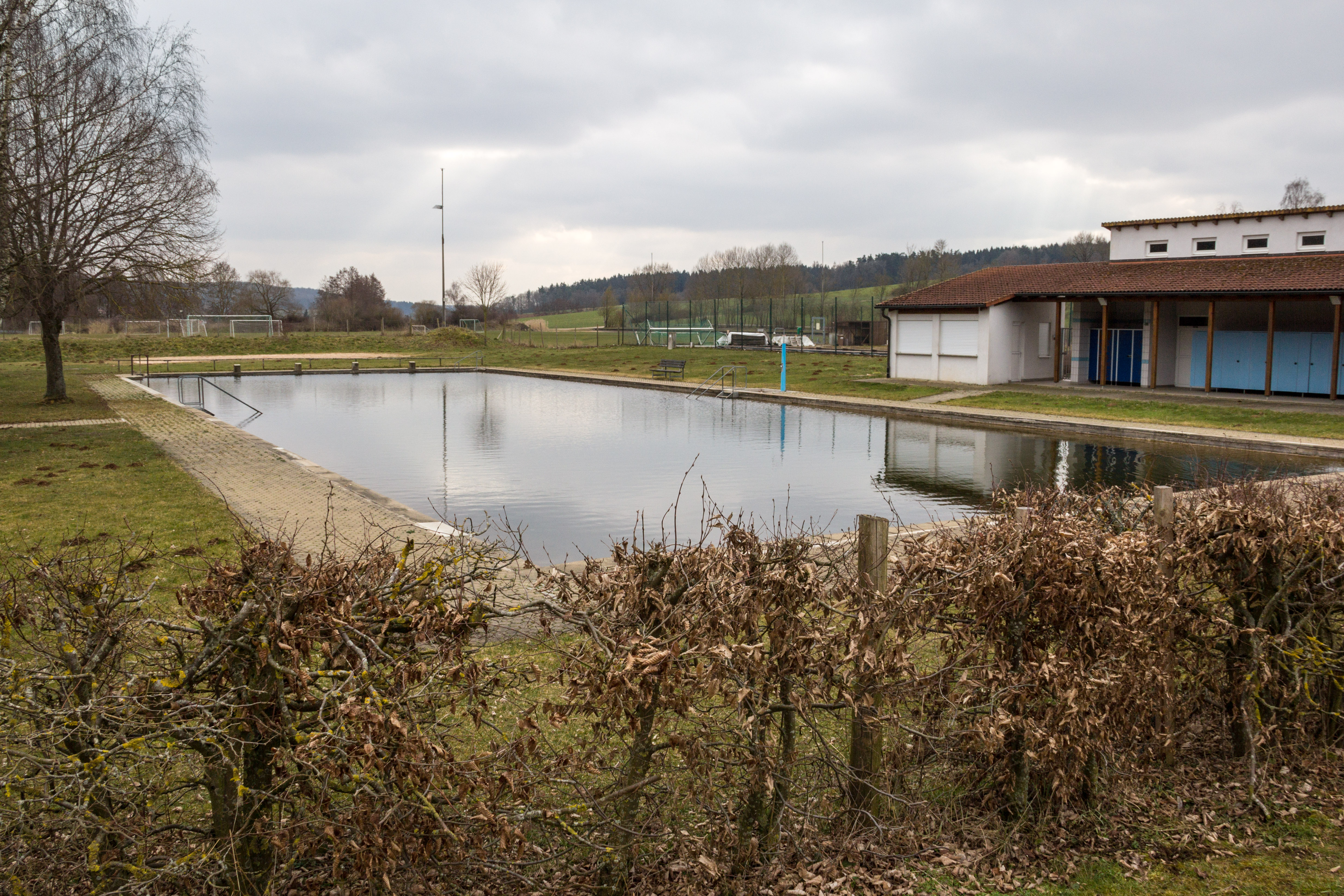 Heidenheim, Hahnenkamm, Schwimmbad